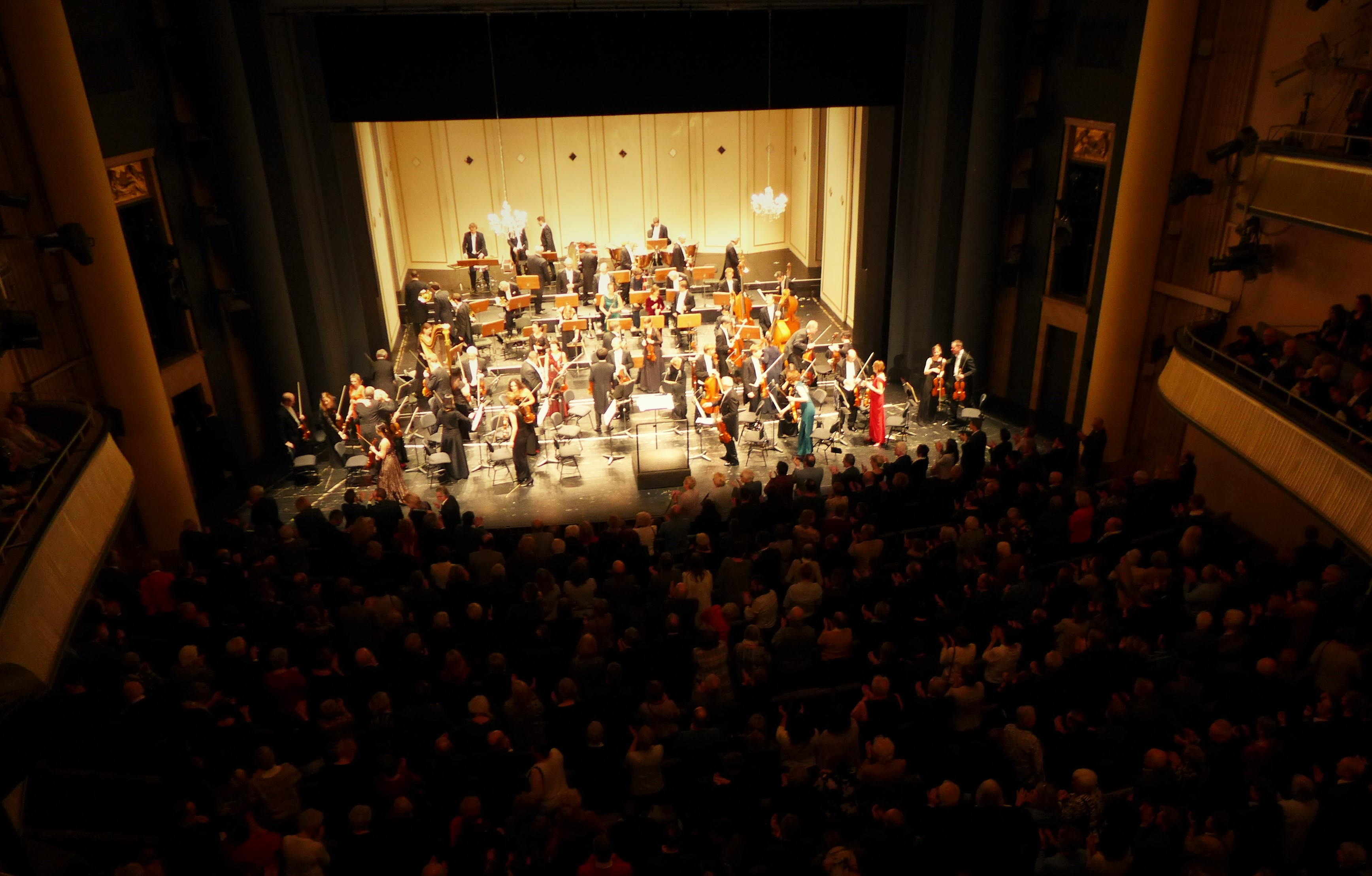 Saarländisches Staatsorchester nach einem Konzert im Staatstheater